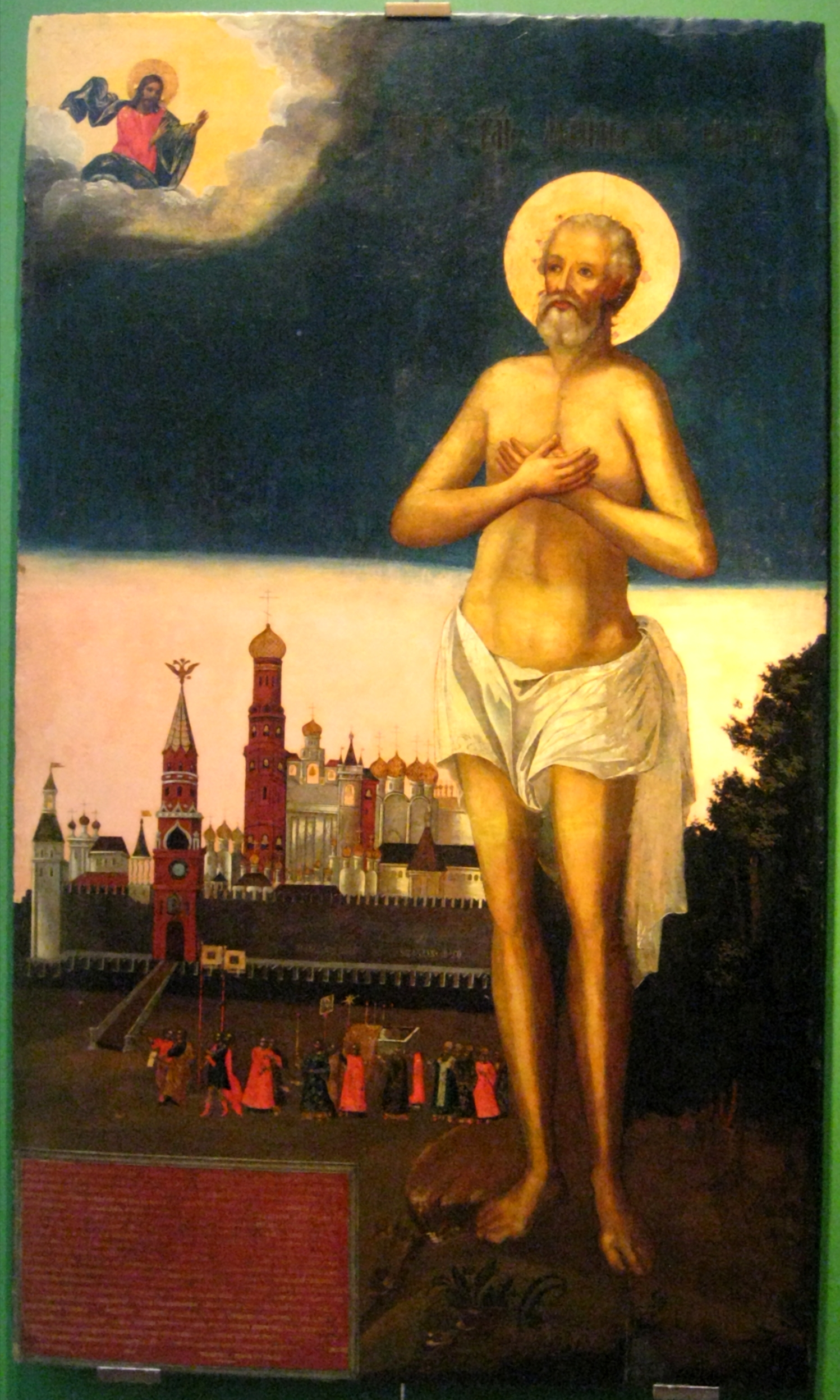 Максим Блаженный. 18 век, Москва. ГТГ.